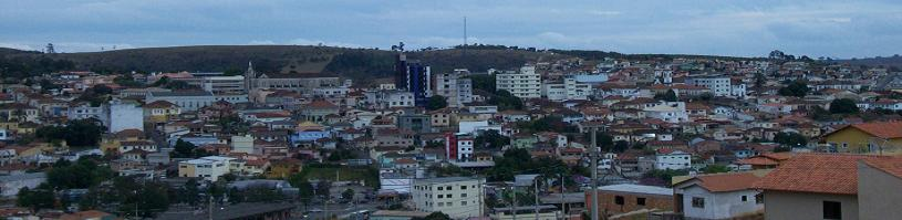 A princesa do oeste